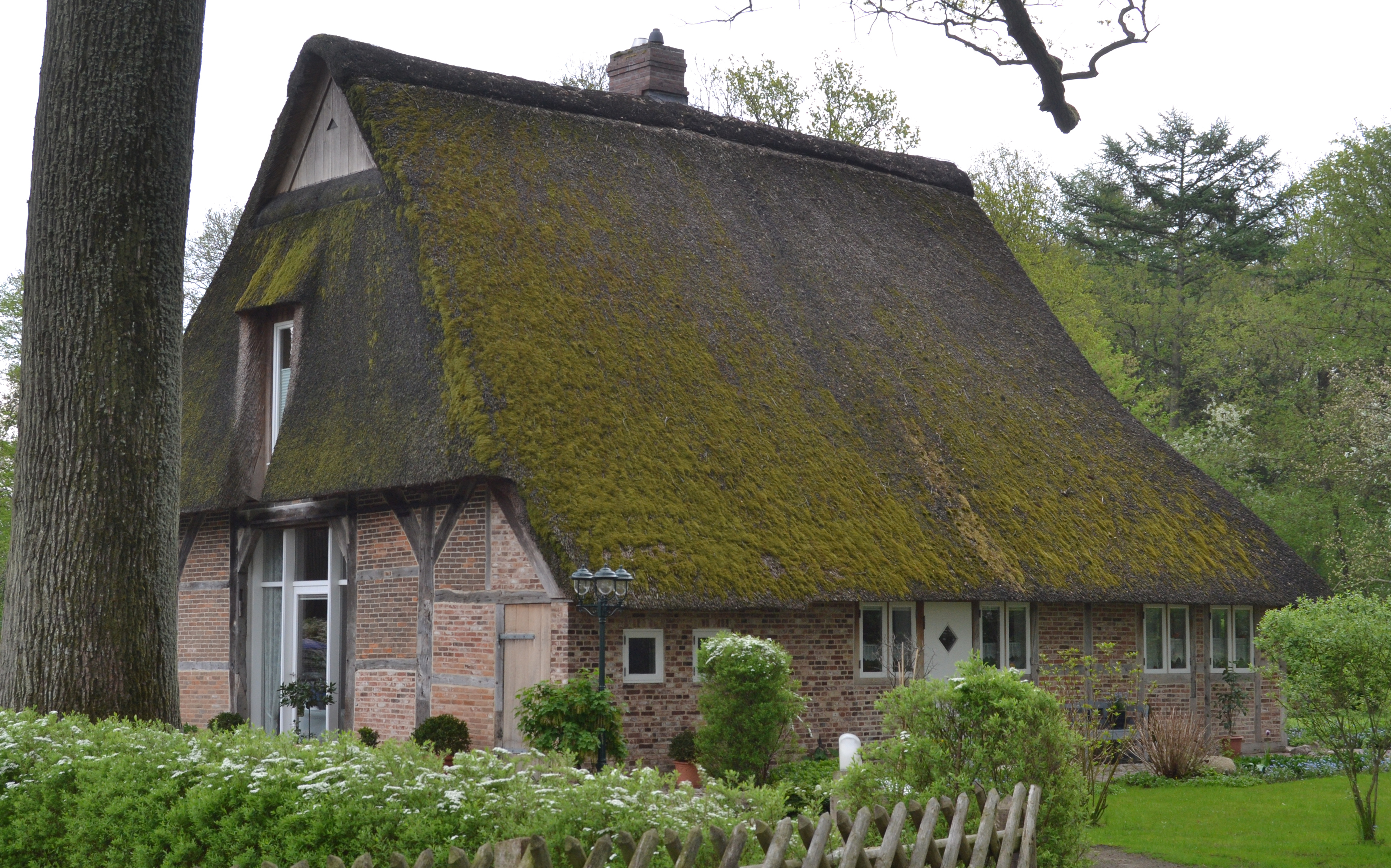 Die Kate in Hütten in Groß Offenseth-Aspern (Kulturdenkmal).